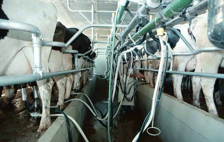 Tambo en Ataliva